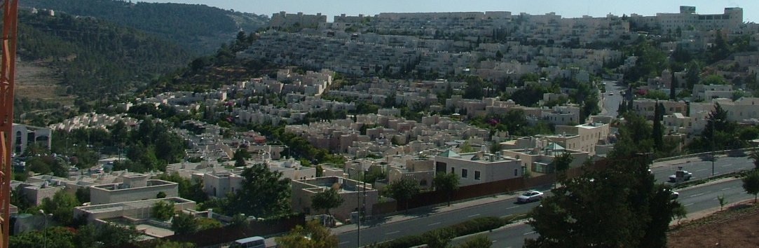 Malha, Jerusalem, Israel